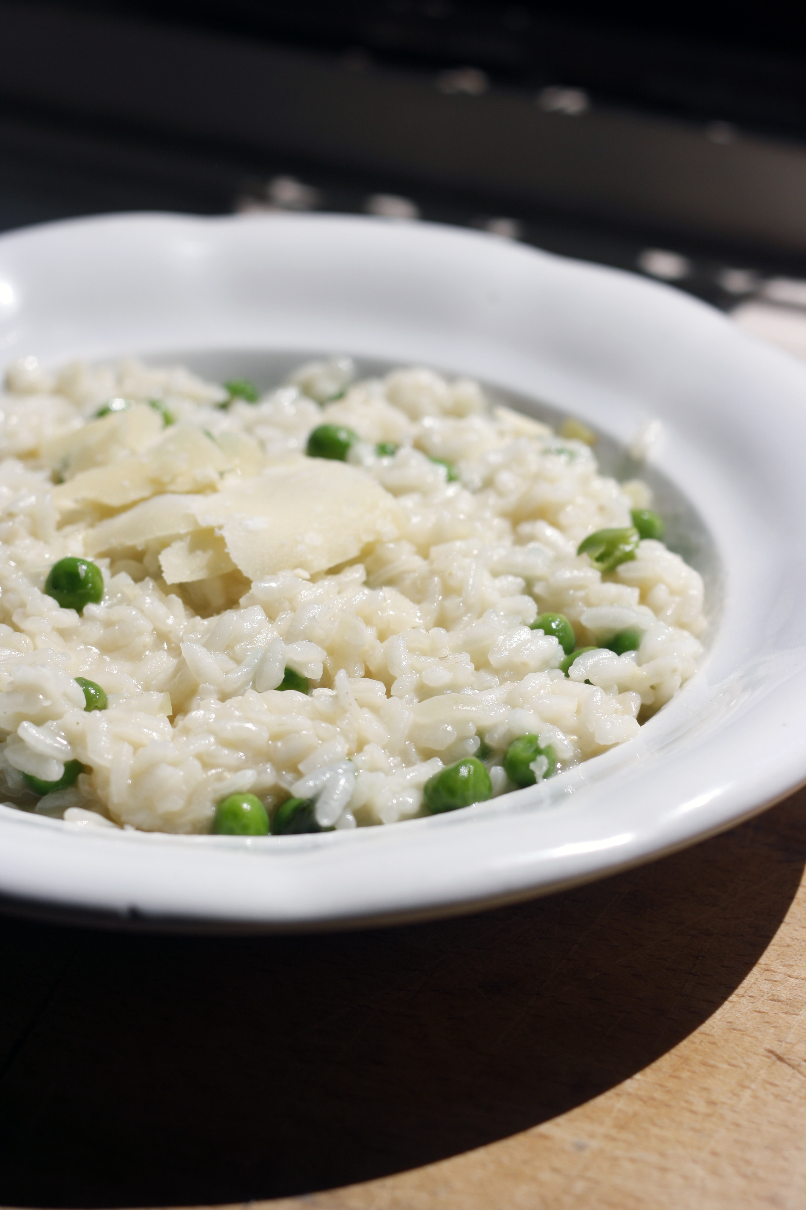 Italské rizoto.